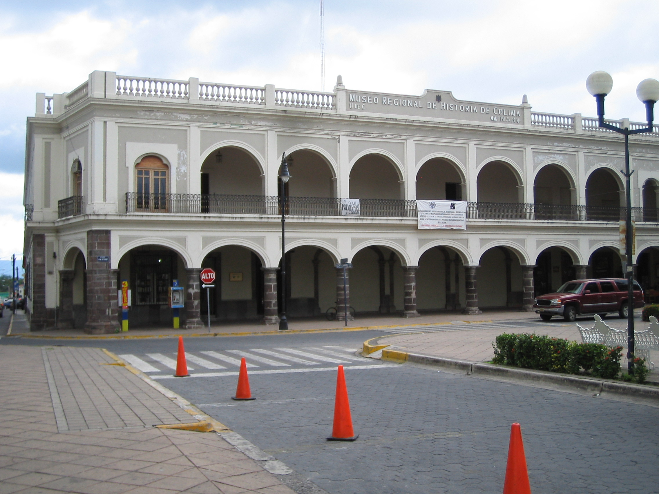 Museo Regional de Historia de Colima por el gobierno del Estado, Universidad de Colima e INAH.